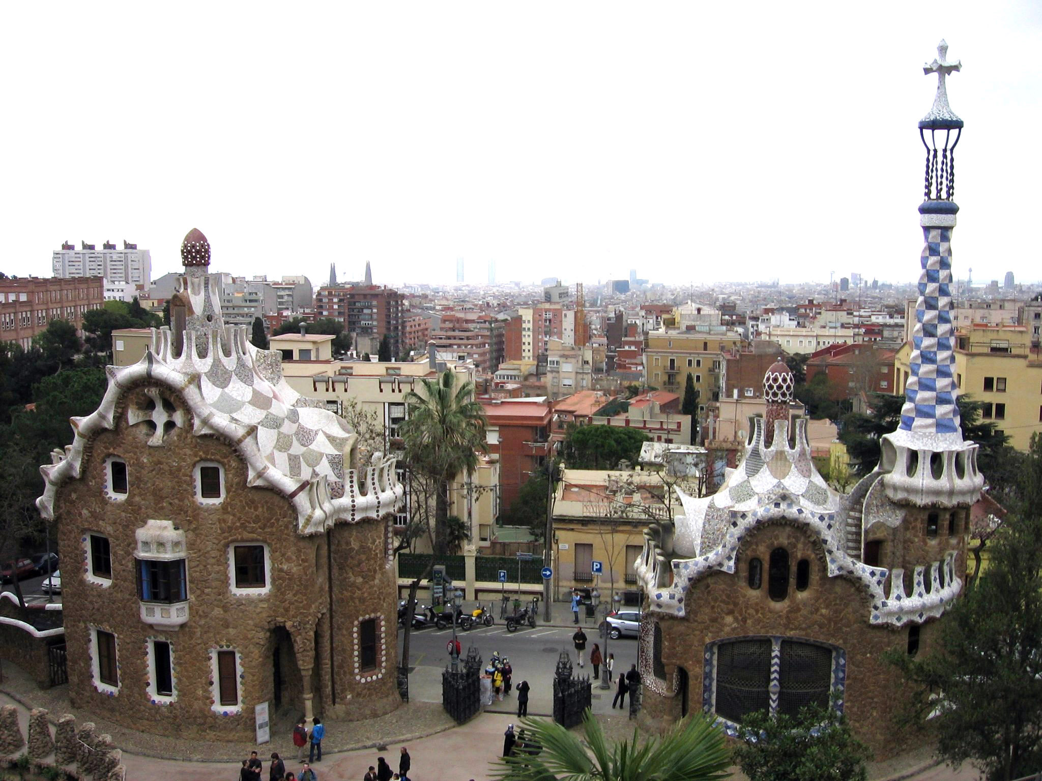 Park Güell - Pabellones